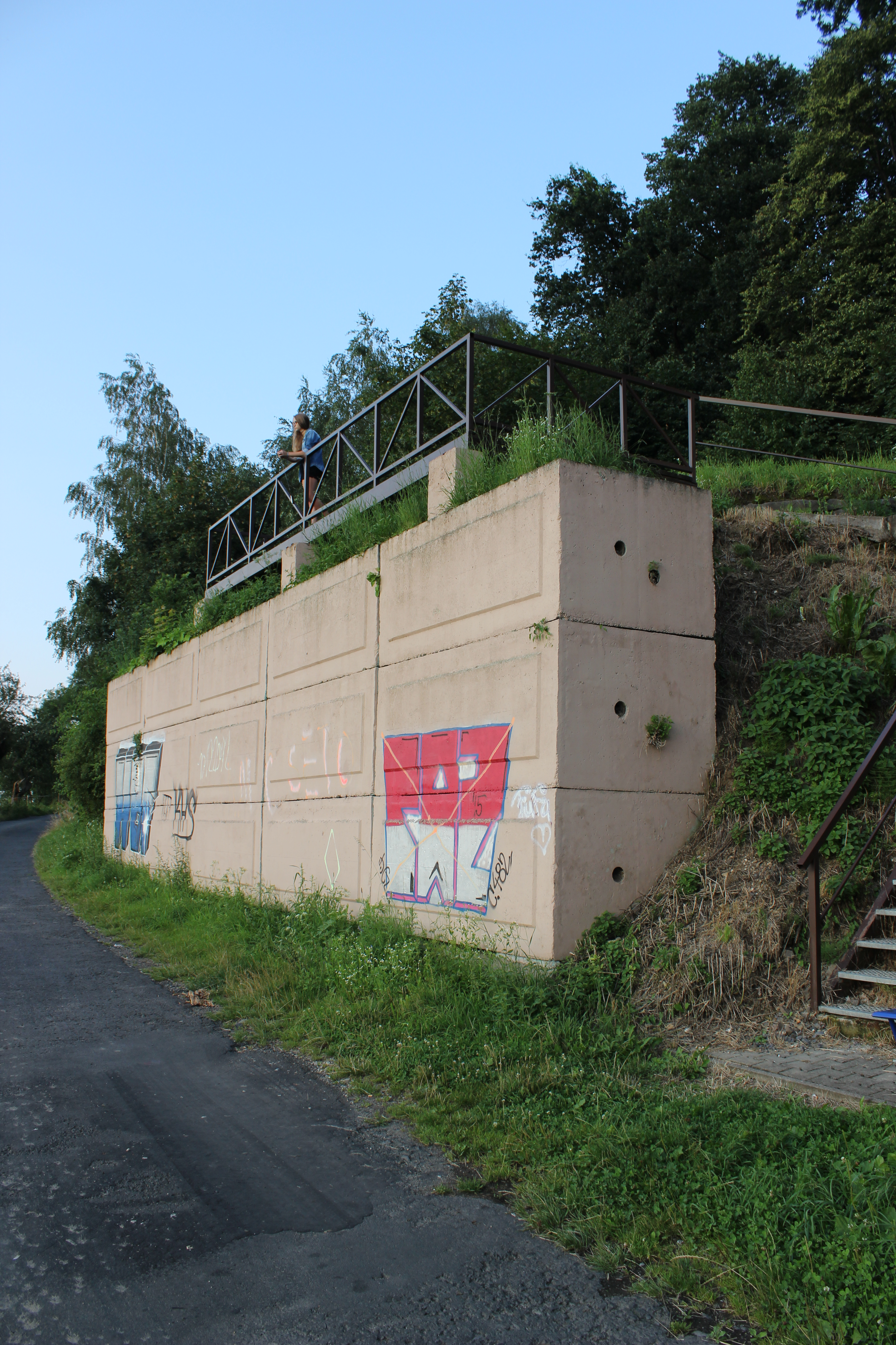 Vodojem na Supím vrchu u Frýdlantu.